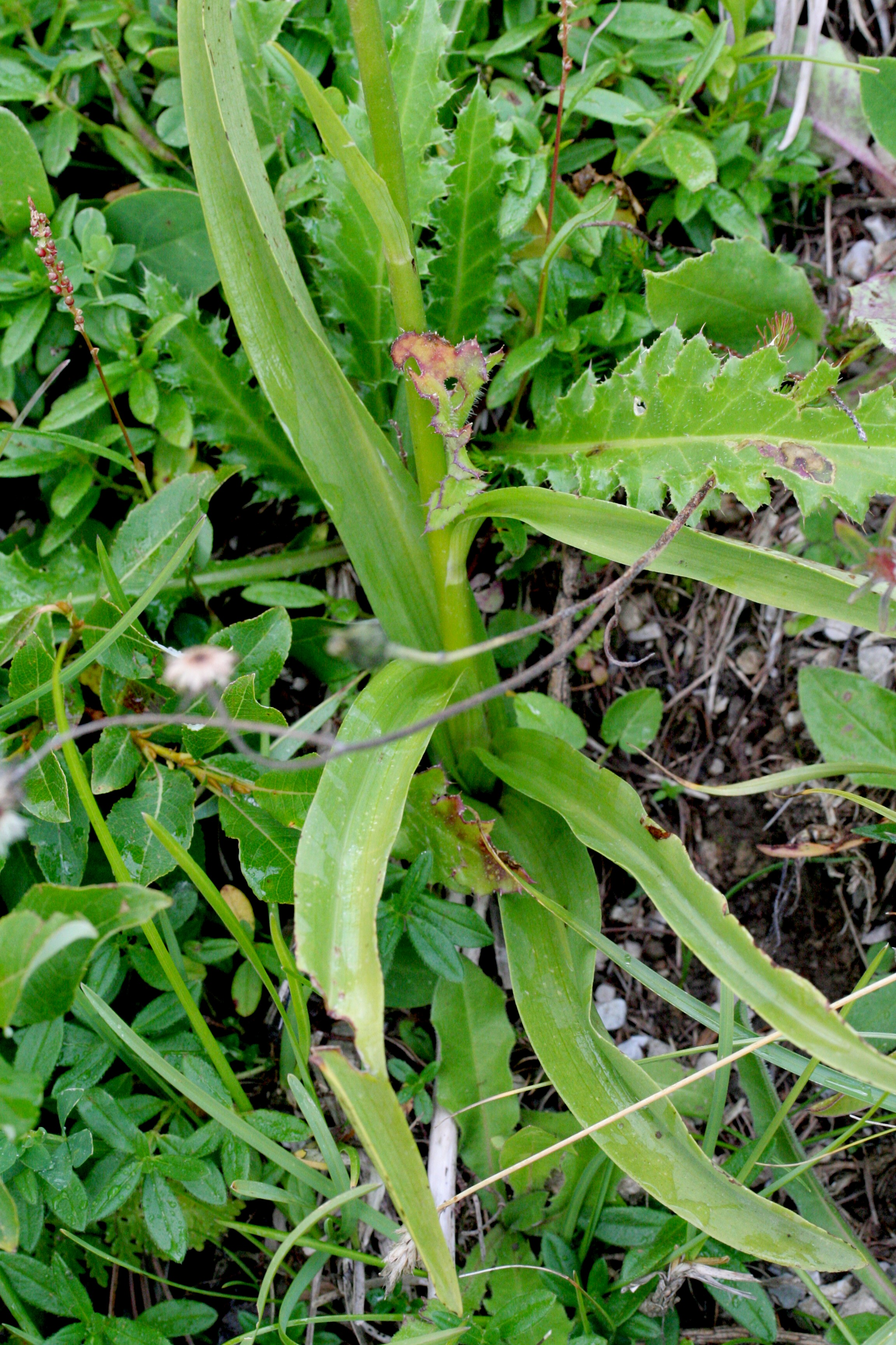 Manina rosea - Località: Cortina (BL), 1400 m s.l.m.